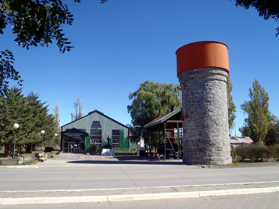 Apeadero Km 191 desde la calle, donde antes pasaban las vías